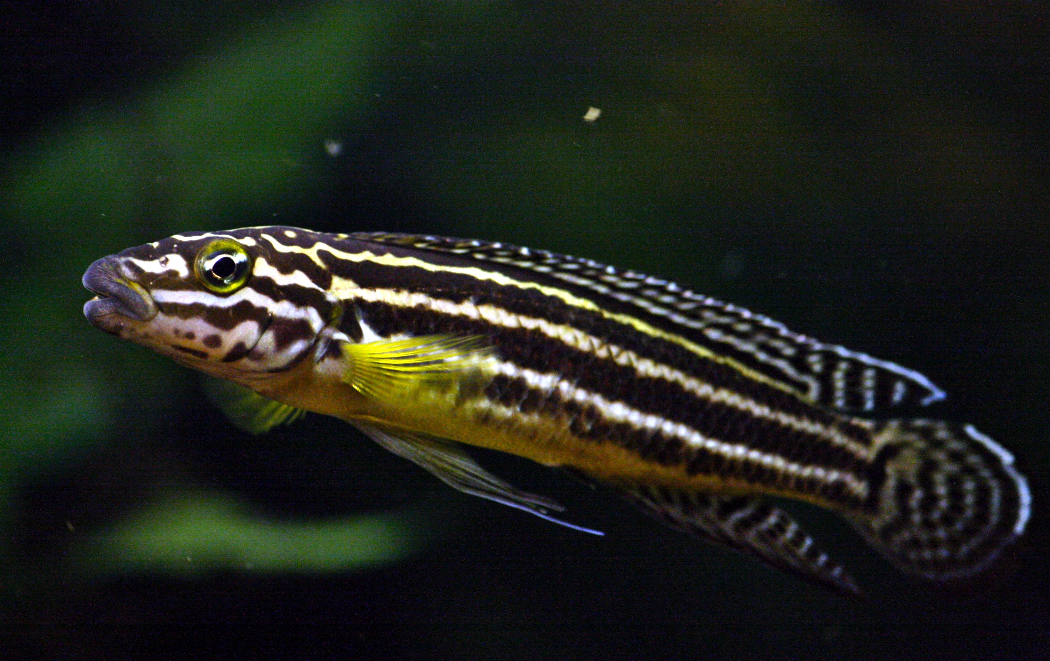 Adult Julidochromis regani